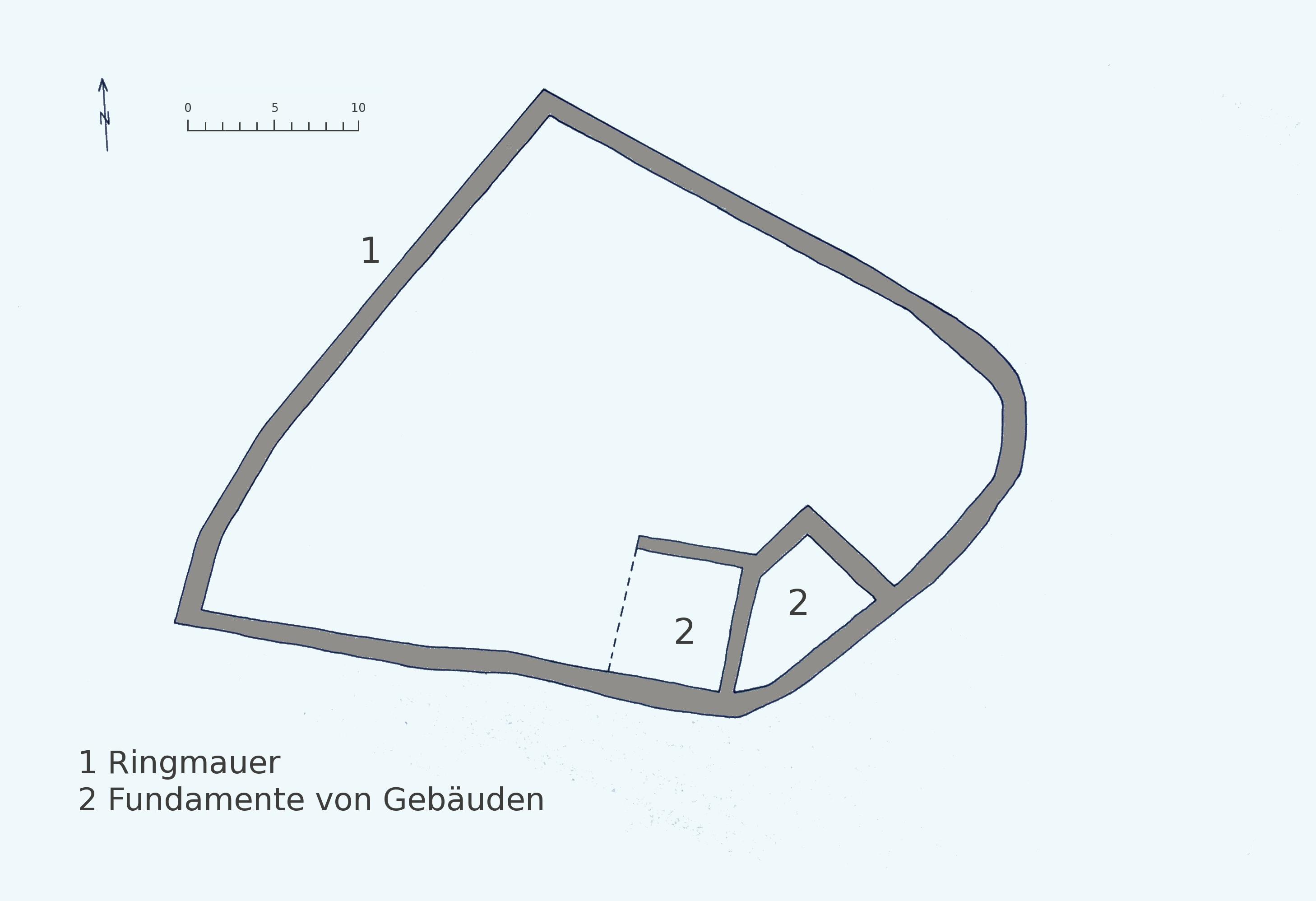 Ruine Wulp Wulp im 11. Jhd.